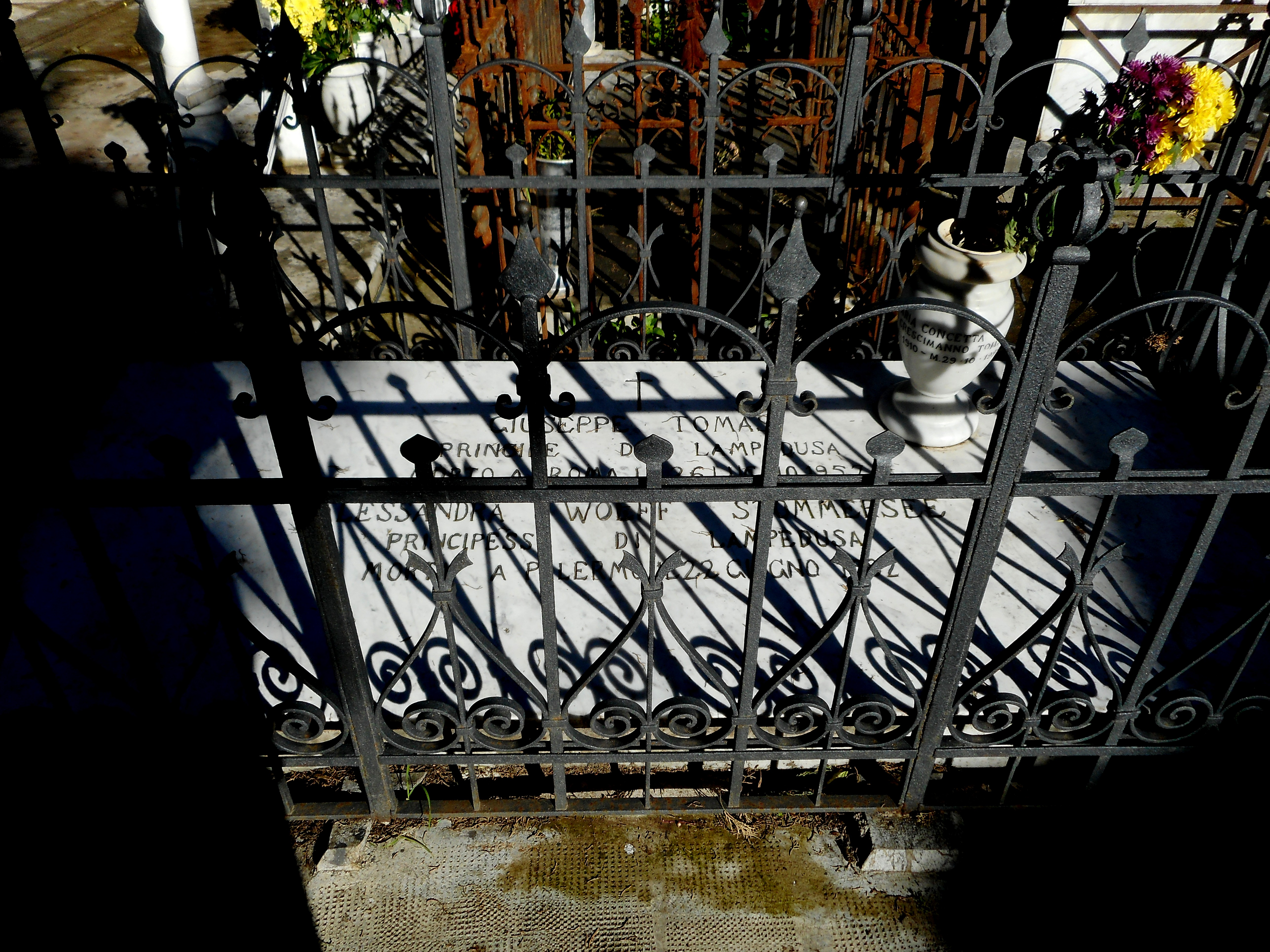 Tomba di Giuseppe Tomasi di Lampedusa e della moglie Alessandra Wolff nel Cimitero dei Cappuccini